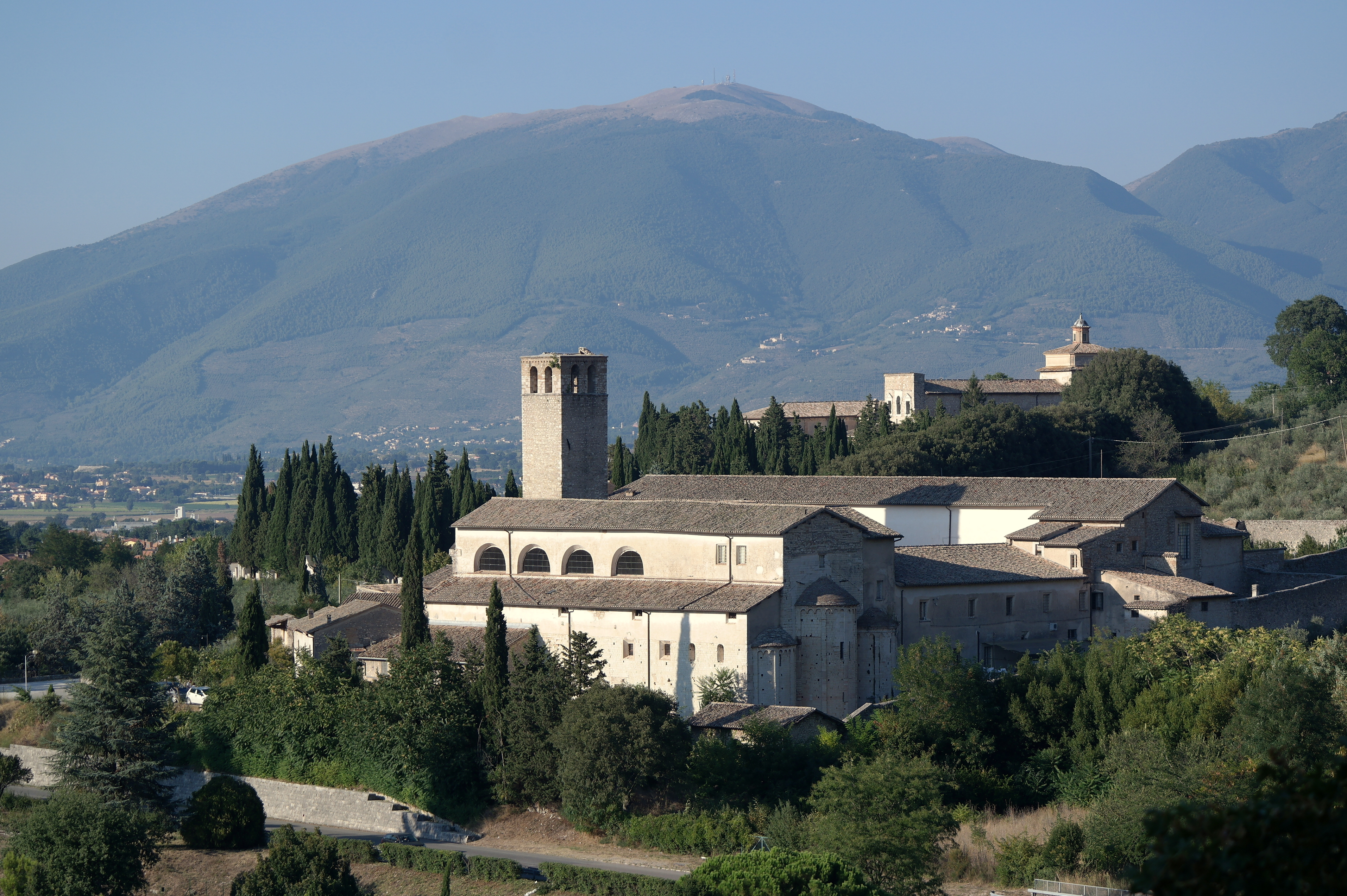 Chiesa di San Ponziano vista dalla città alta di Spoleto